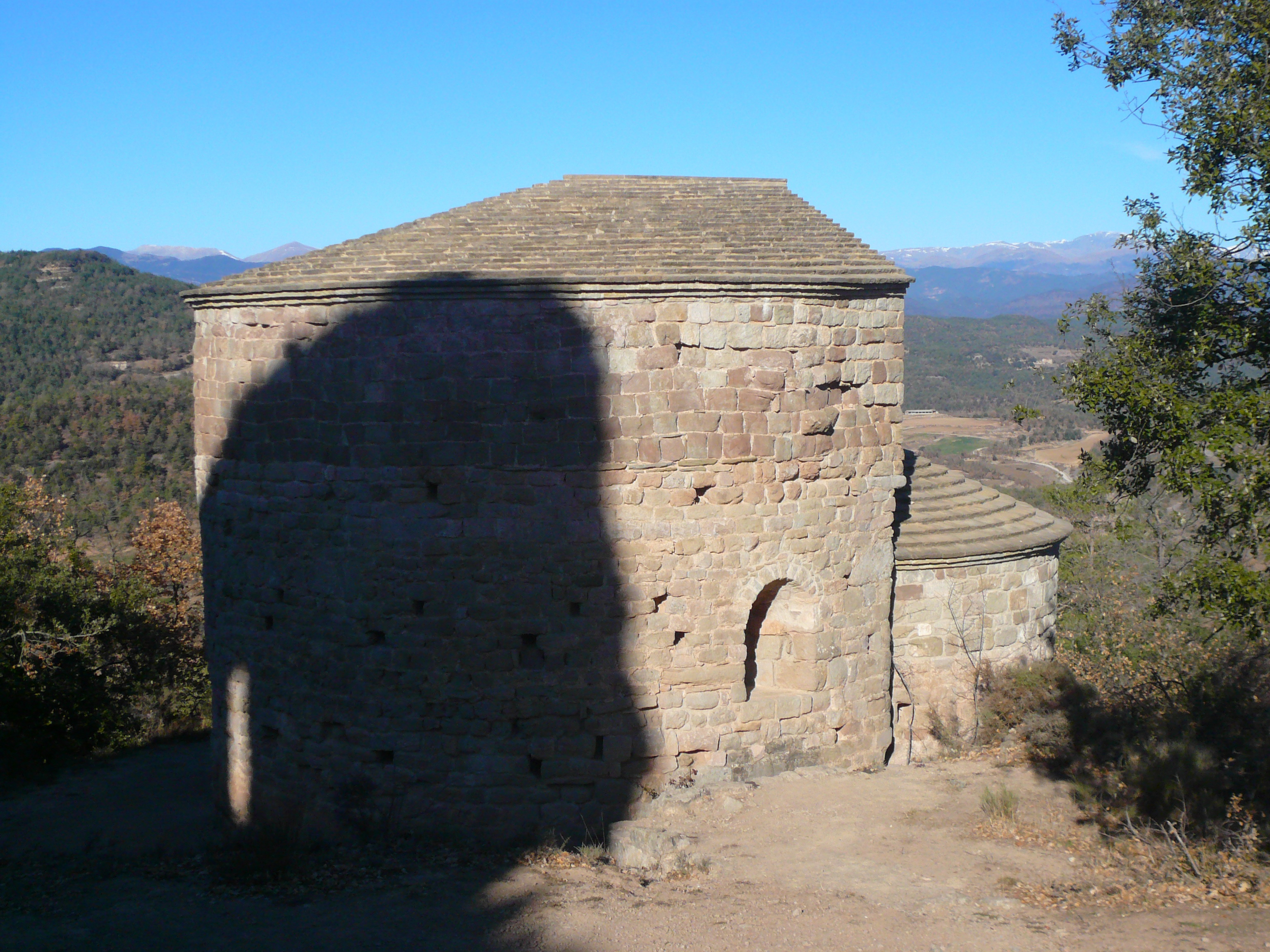 Castell de Lluçà